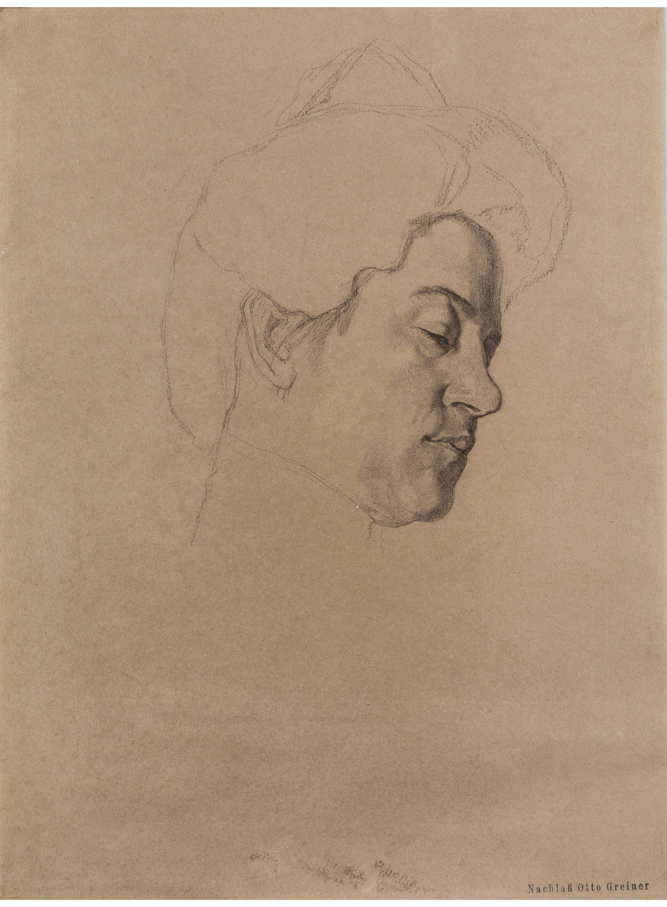 Otto Greiner: Nannina Greiner, Kohle auf Papier, 45 x 34 cm, Rechts unten Nachlassstempel